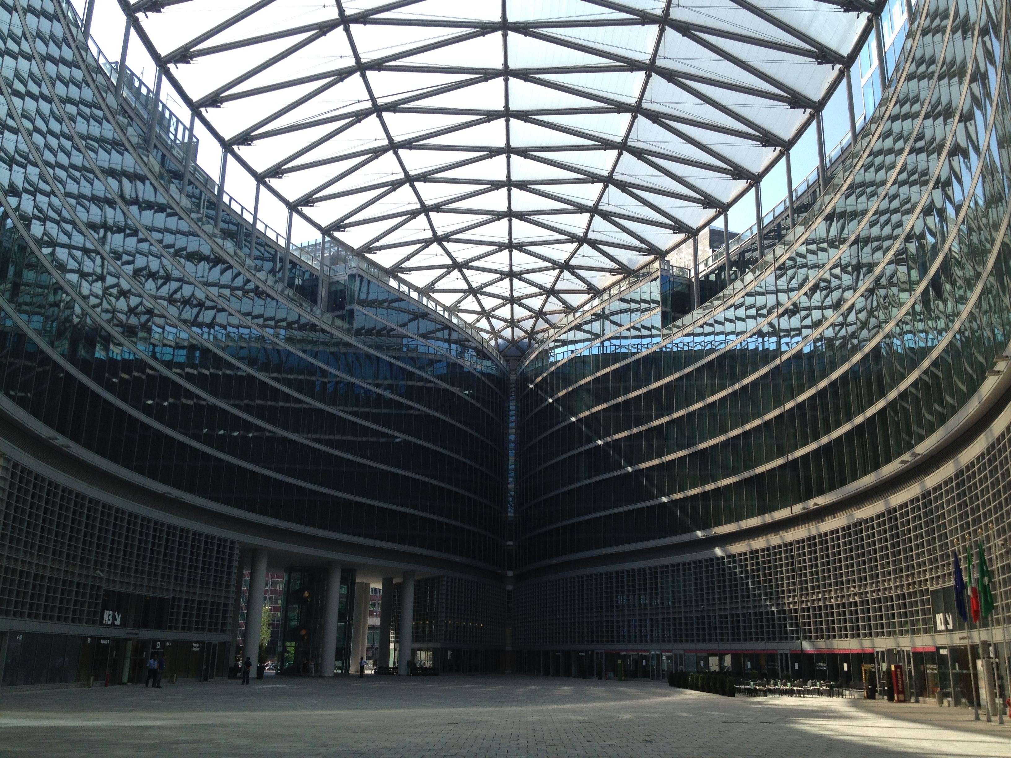 Vista larga della piazza sotto Palazzo Lombardia.